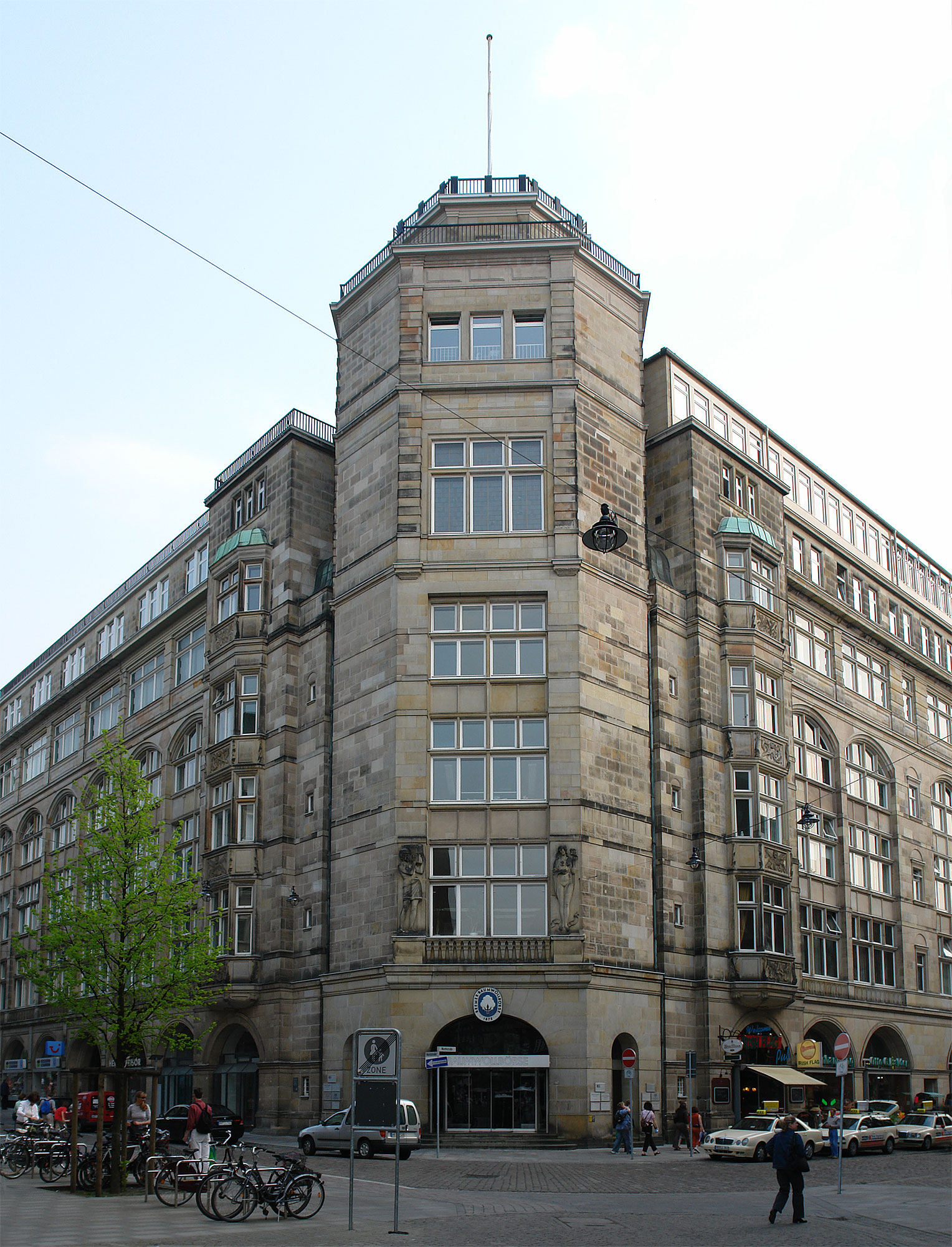 Baumwollbörse in BremenDas abgebildete Objekt ist ein geschütztes Kulturdenkmal in der Freien Hansestadt Bremen, mit der Nr. 1191 beim Landesamt für Denkmalpflege registriert.